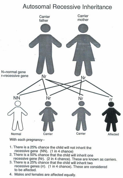 Diušeno raumenų distrofija yra viena dažniausiai pasitaikančių raumenų distrofijos rūšių. Ji paveldima per X chromosomą.